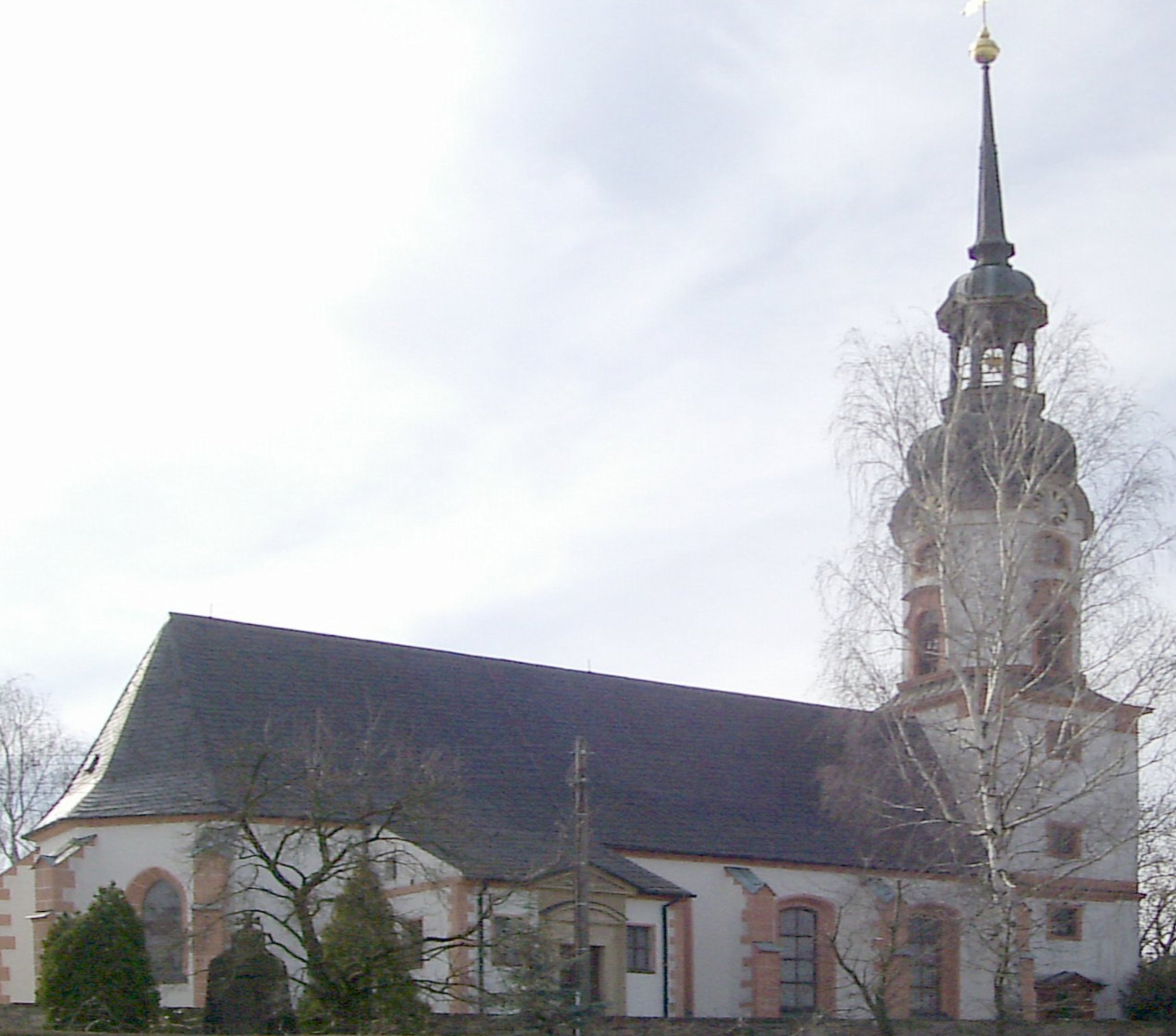 Kirche im Bornaer Ortsteil Zedtlitz